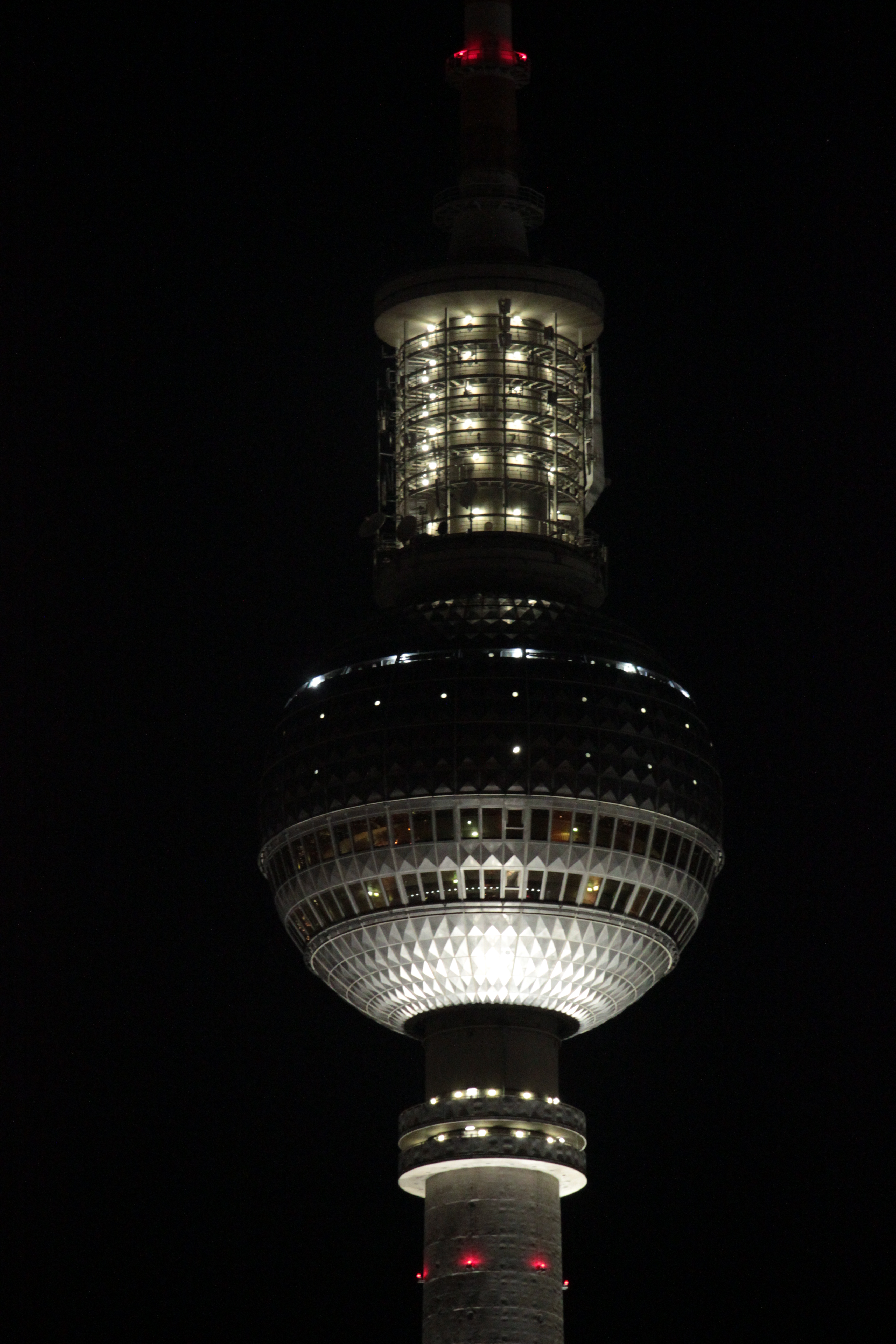 Der Berliner Fernsehturm mit seiner nur an den drei Weihnachtstagen sowie zu Silvester und Neujahr eingeschalteten Festbeleuchtung.